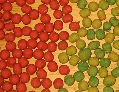 Nach dem kochen folgt das Aushärten. Man färbt die Boilies mit Lebensmittelfarbe ein.